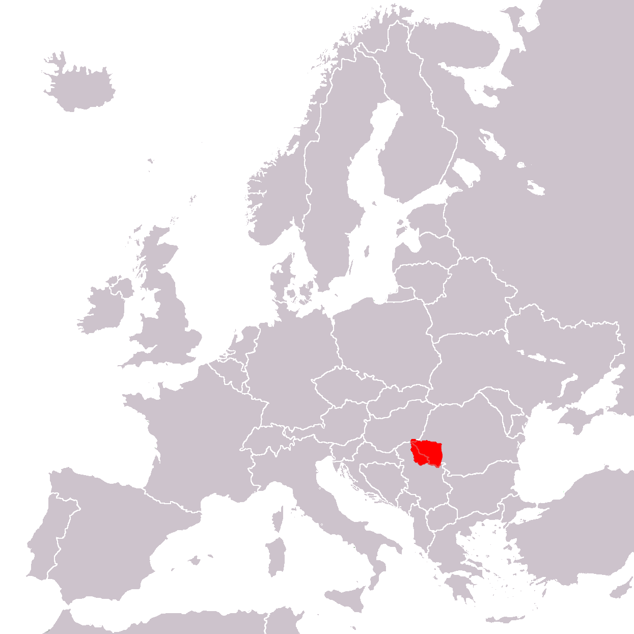 Localizarea Banatului in Europa, pe harta standard din domeniul public